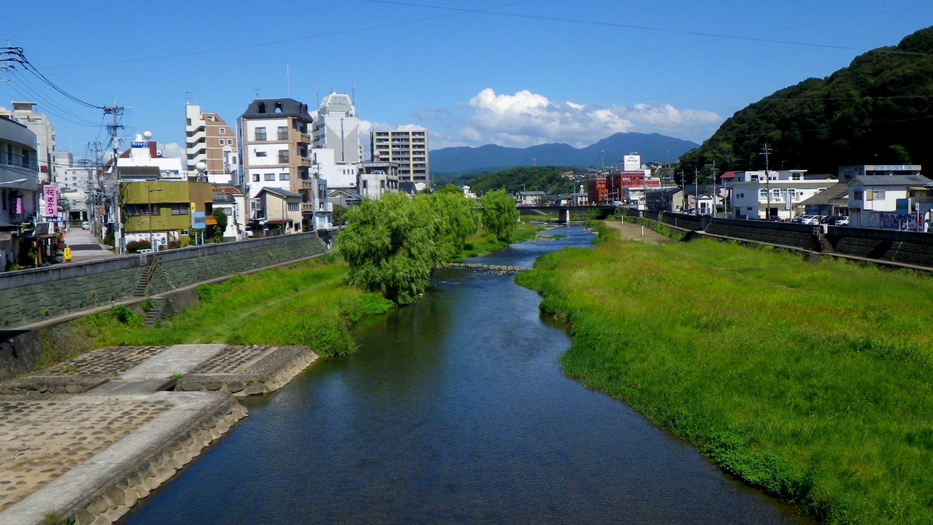 本明川。長崎県諫早市・国道207号四面橋上より撮影。